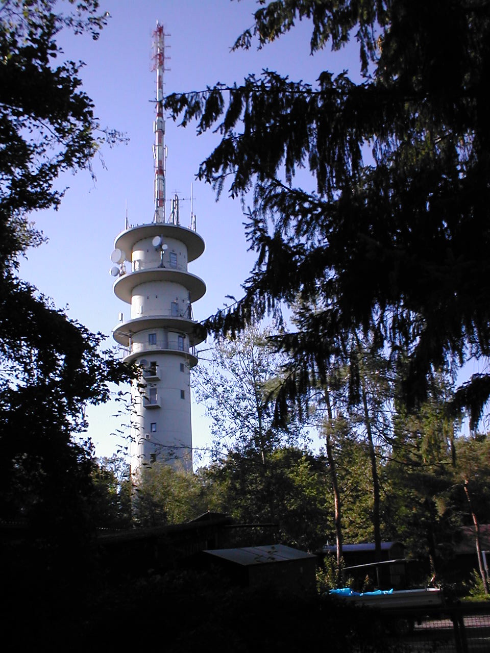 Fernmeldeturm auf dem Schweinsberg, höchster Punkt von Heilbronn. 371 m ü NN, Höhe des Turms: 89,20 m.